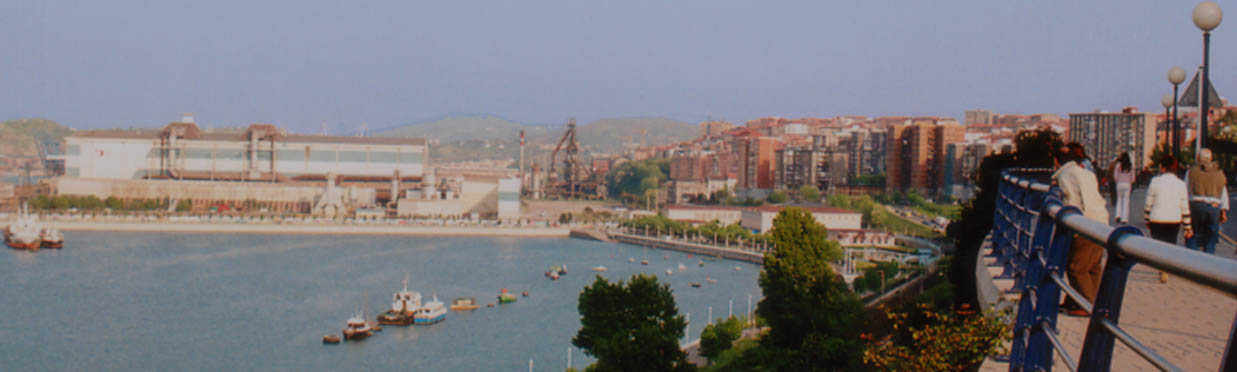 Sestao visto desde el paseo a Portugalete; con la ACB (Acería Compacta de Bizkaia) a la izquierda y en el centro un antiguo alto horno. Realizada por Josu P, el 7 de mayo de 2006. Tomada con Pentax MZ50, 35-80